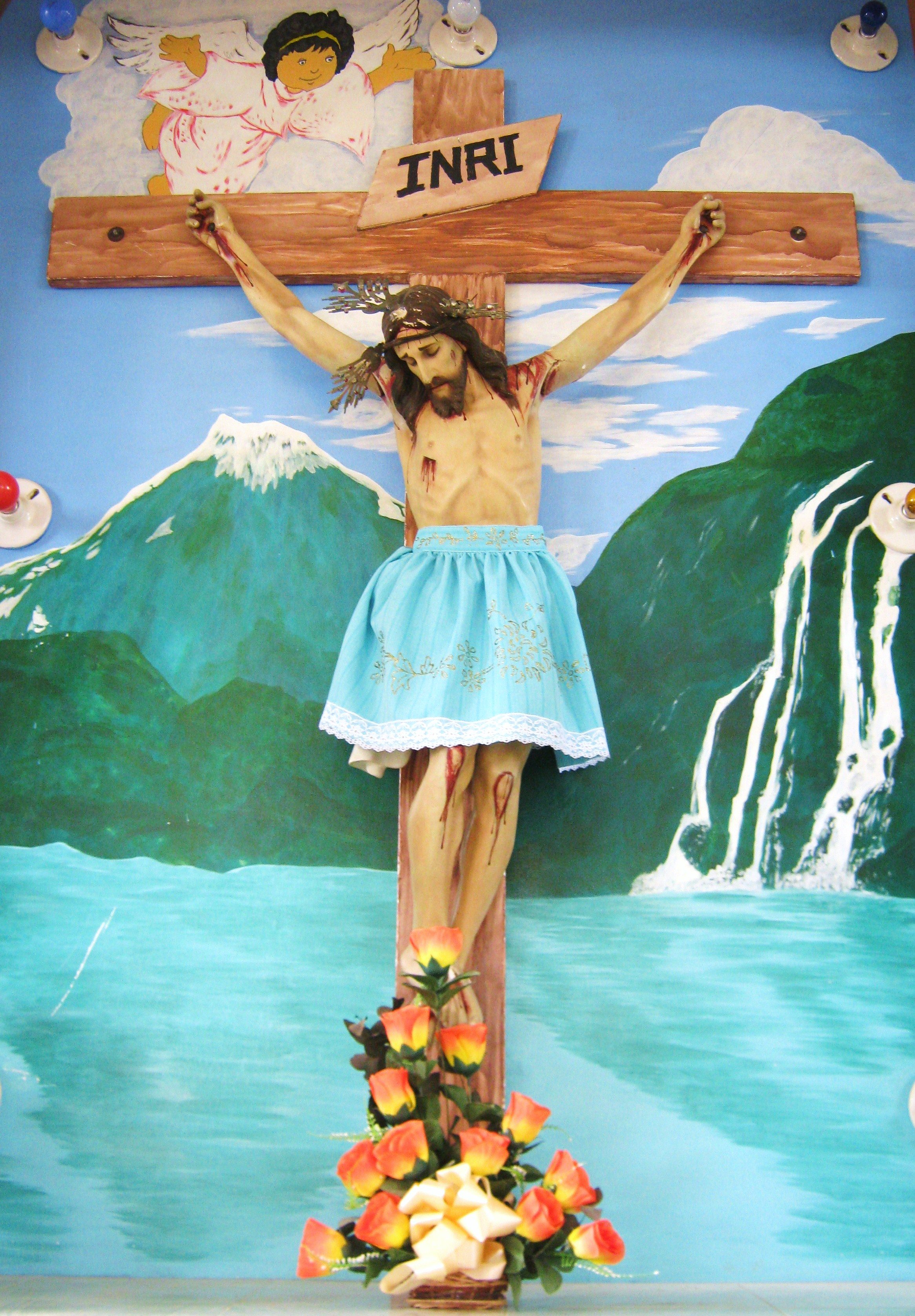 Señor de Los Milagros Venerado en Monopamba (Nariño-Colombia)